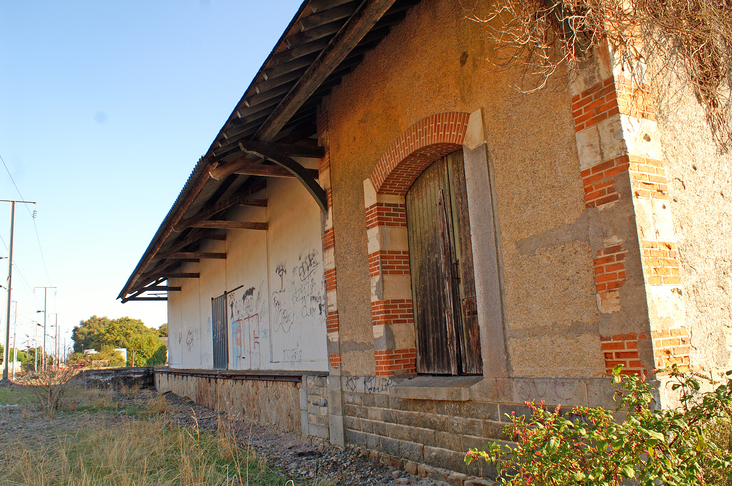 Ancienne halle à marchandises de la gare de Gestel. On remarque la partie la plus ancienne construite par la compagnie du chemin de fer de Paris à Orléans (PO) avec une alternance de briques rouges et de tuffeau blanc.